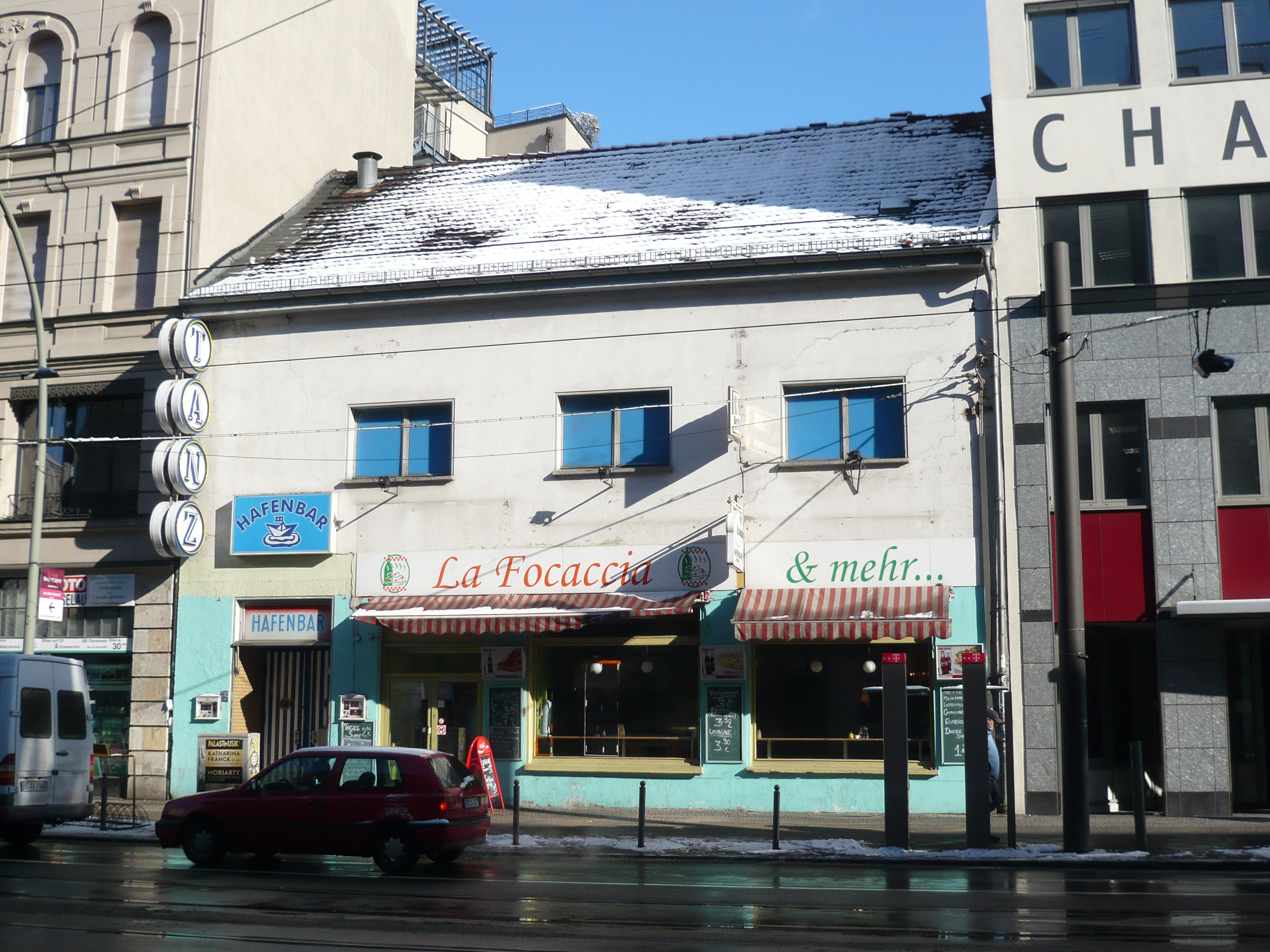 Chausseestrasse in Berlin-Mitte, eh. "Hafenbar"